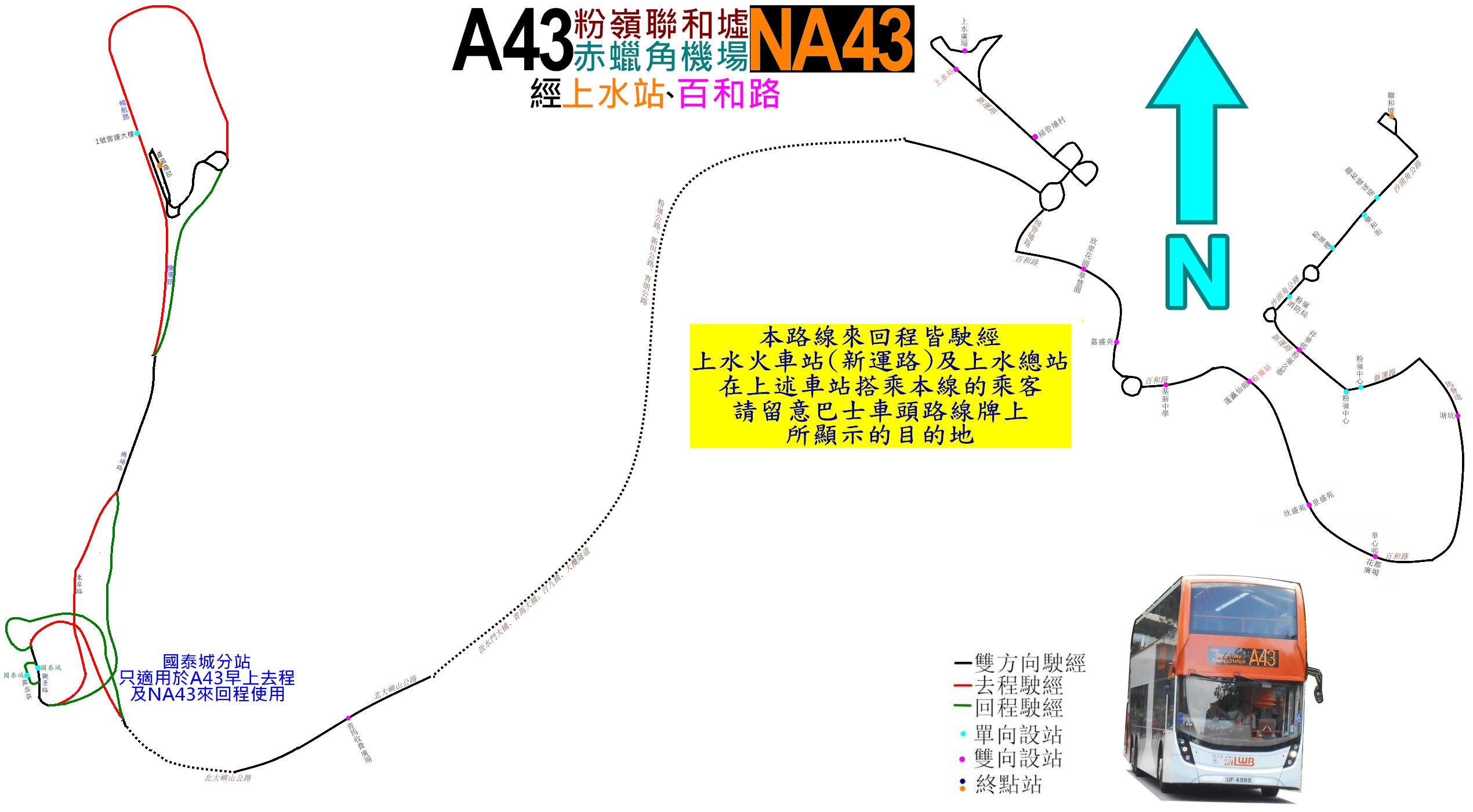 中文（香港）: 龍運巴士A43線的走線圖